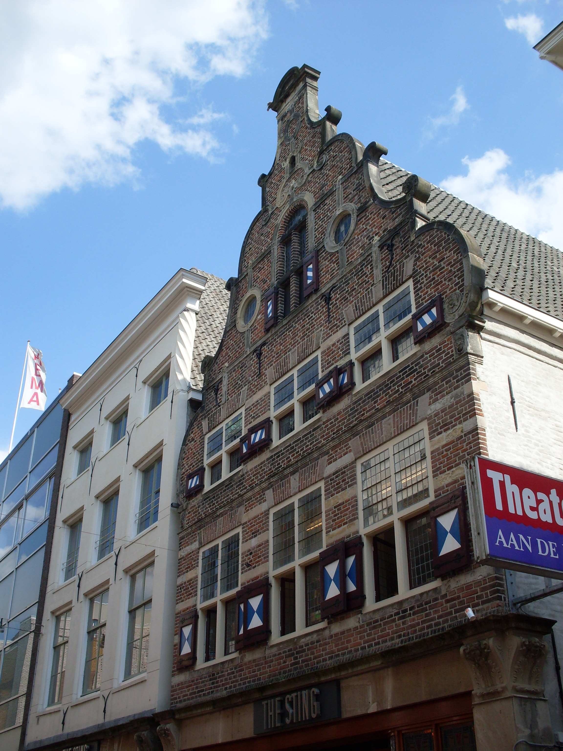 Huis de Moriaan te Arnhem.